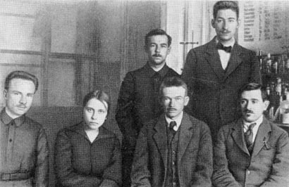 Саратовская группа учеников А. А. Богомольца, 1923 год.